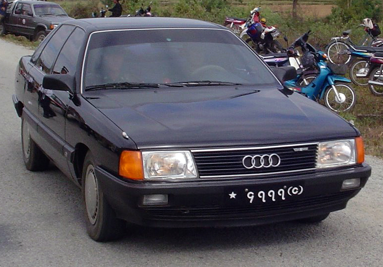 FAW Hongqi built Audi 100 in Myanmar